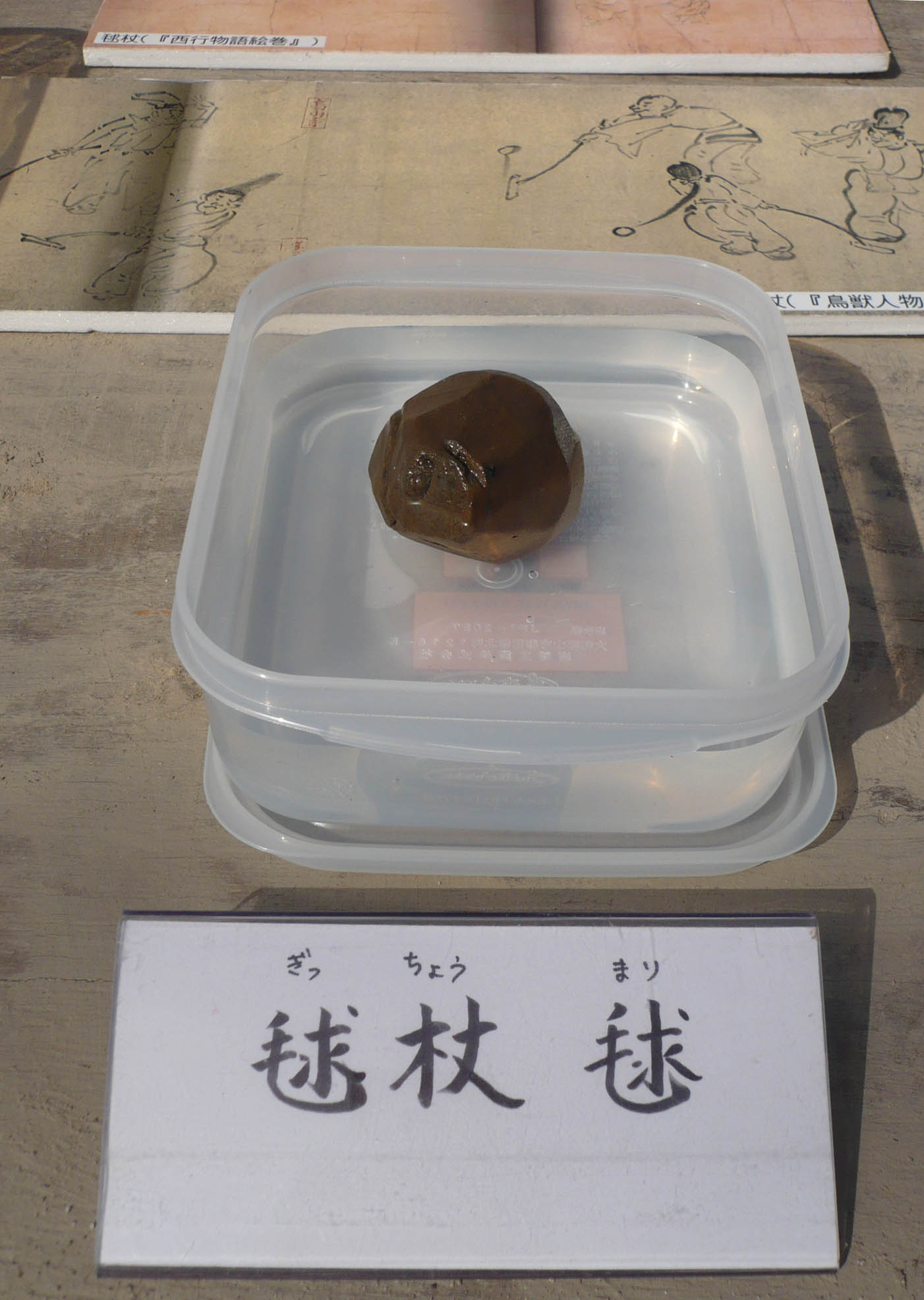 毬枝 毬